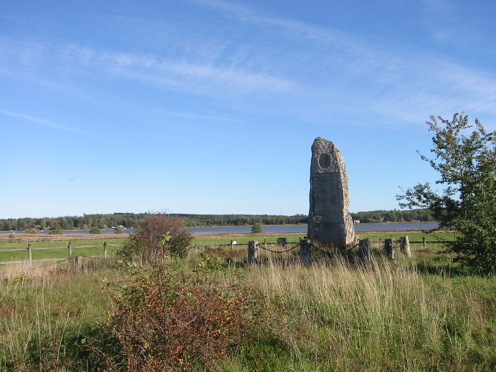 Minnessten vid övningsfältet i Utnäslöt, Strömsholm. I bakgrunden fjärden Freden.